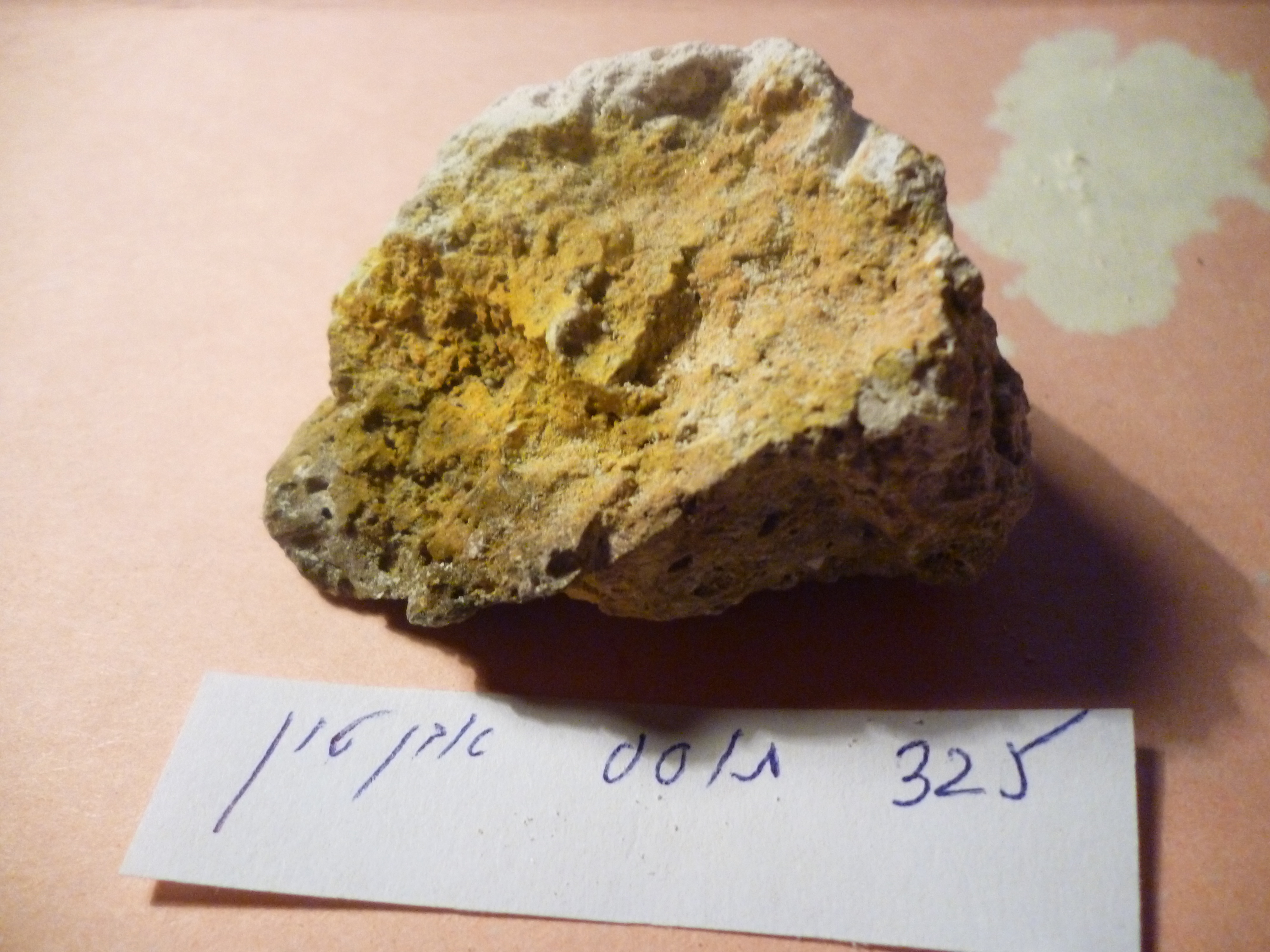 אבן טין